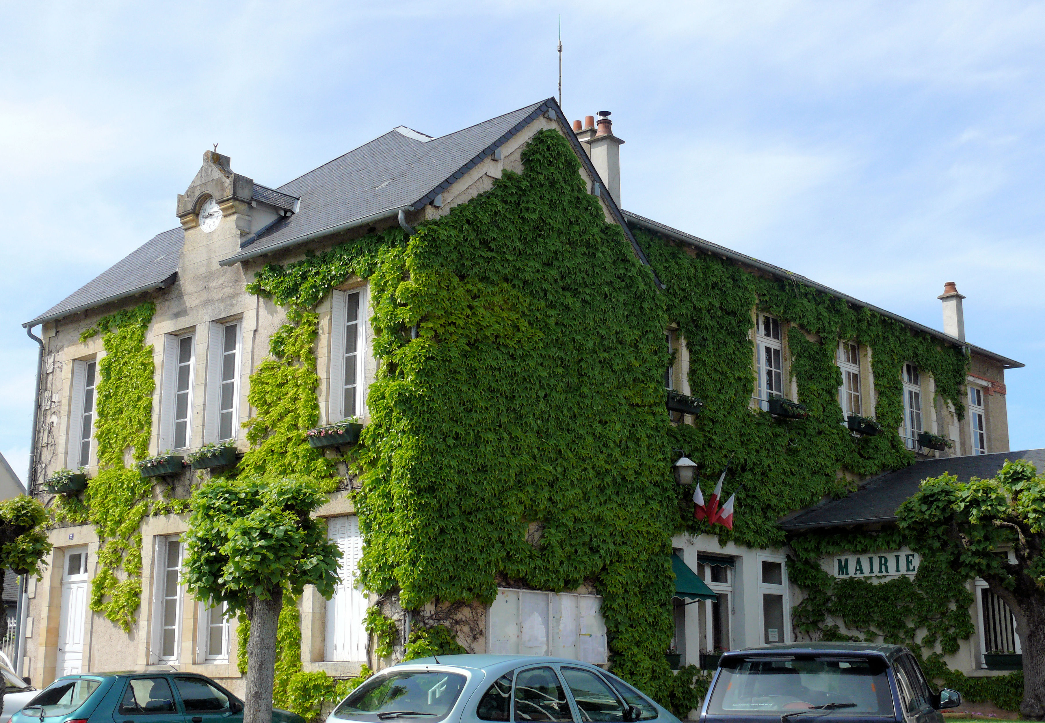 Orval (Cher) - Mairie